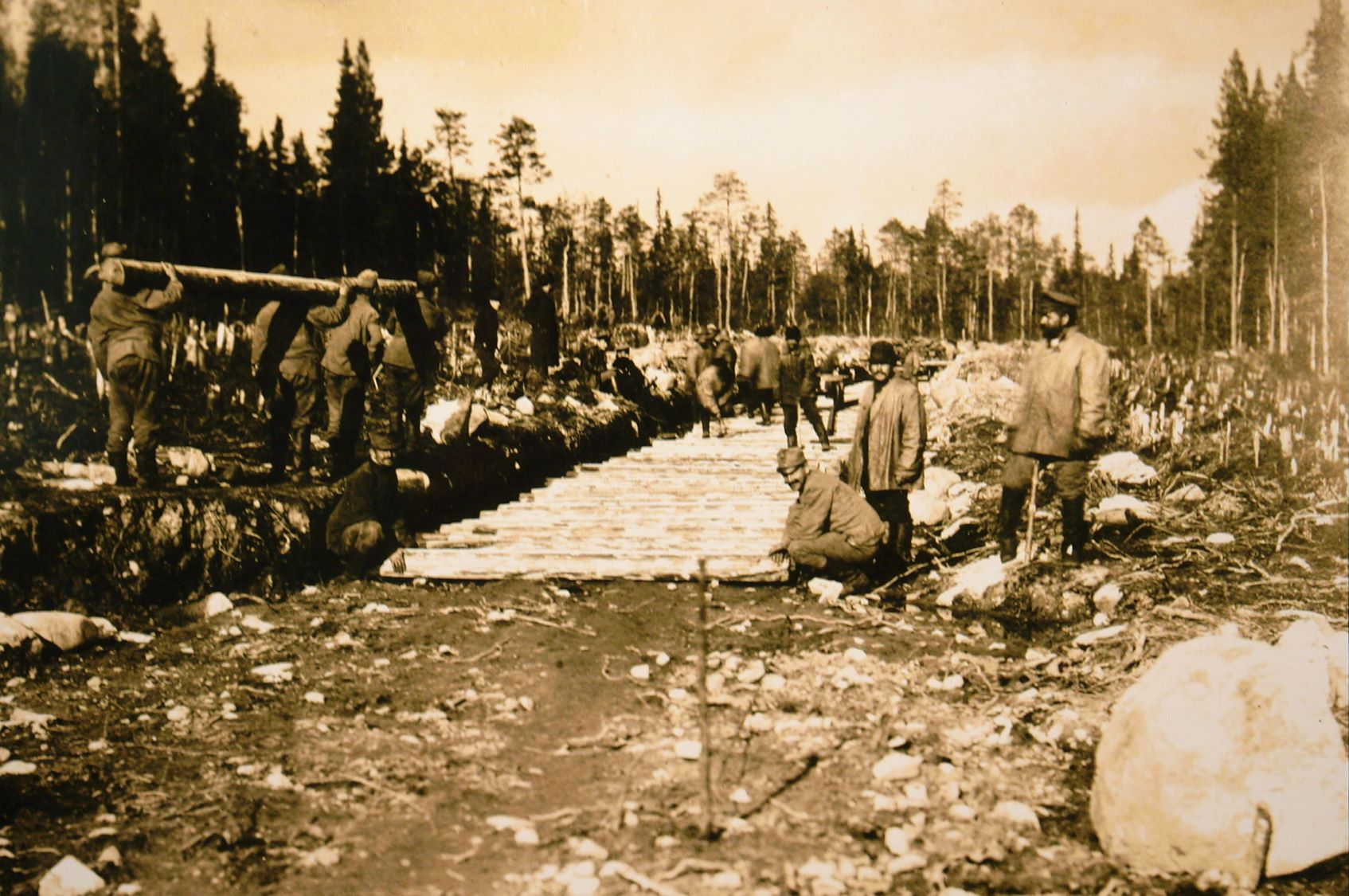 Bau der Murmanbahn